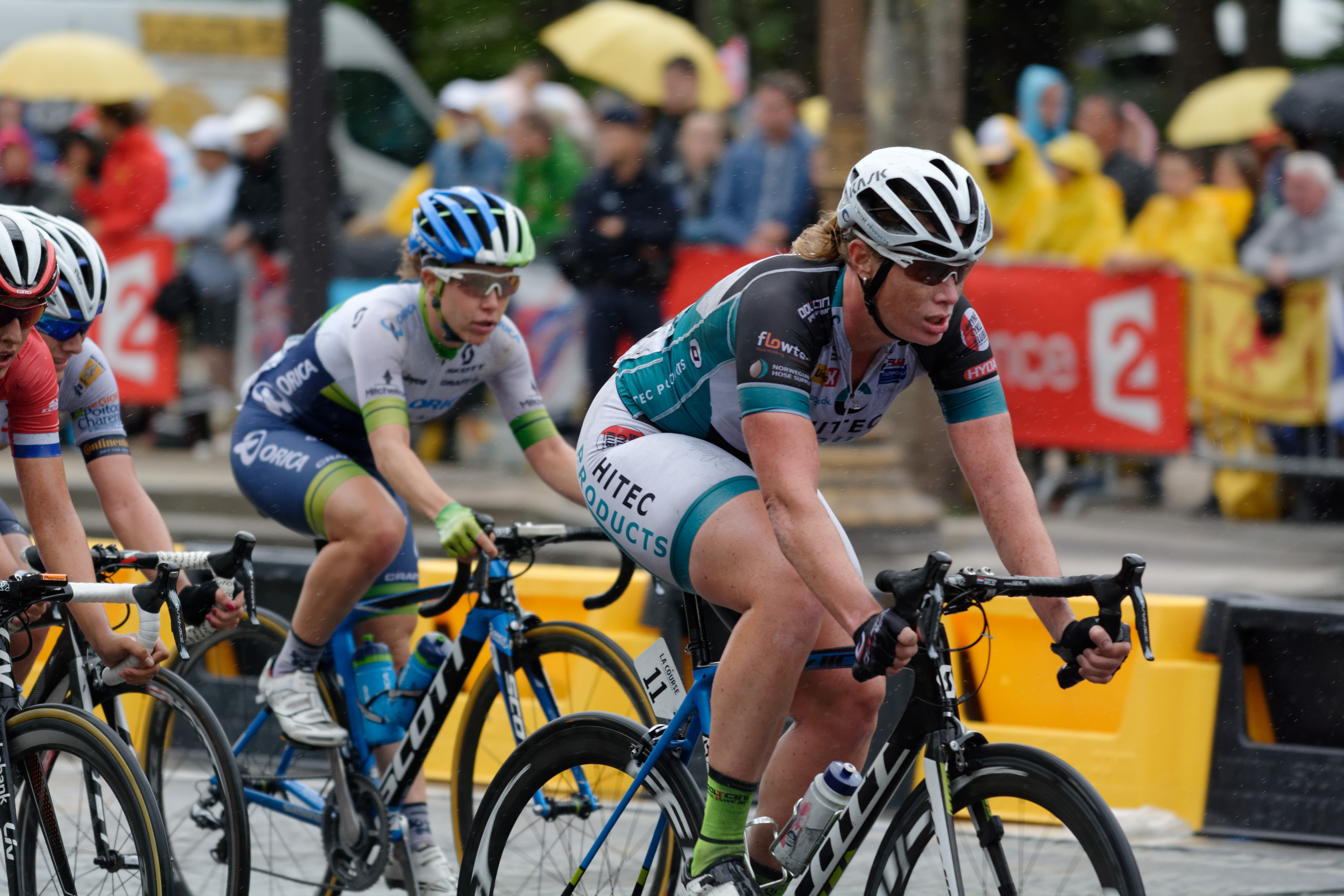 D71_2141_DxO